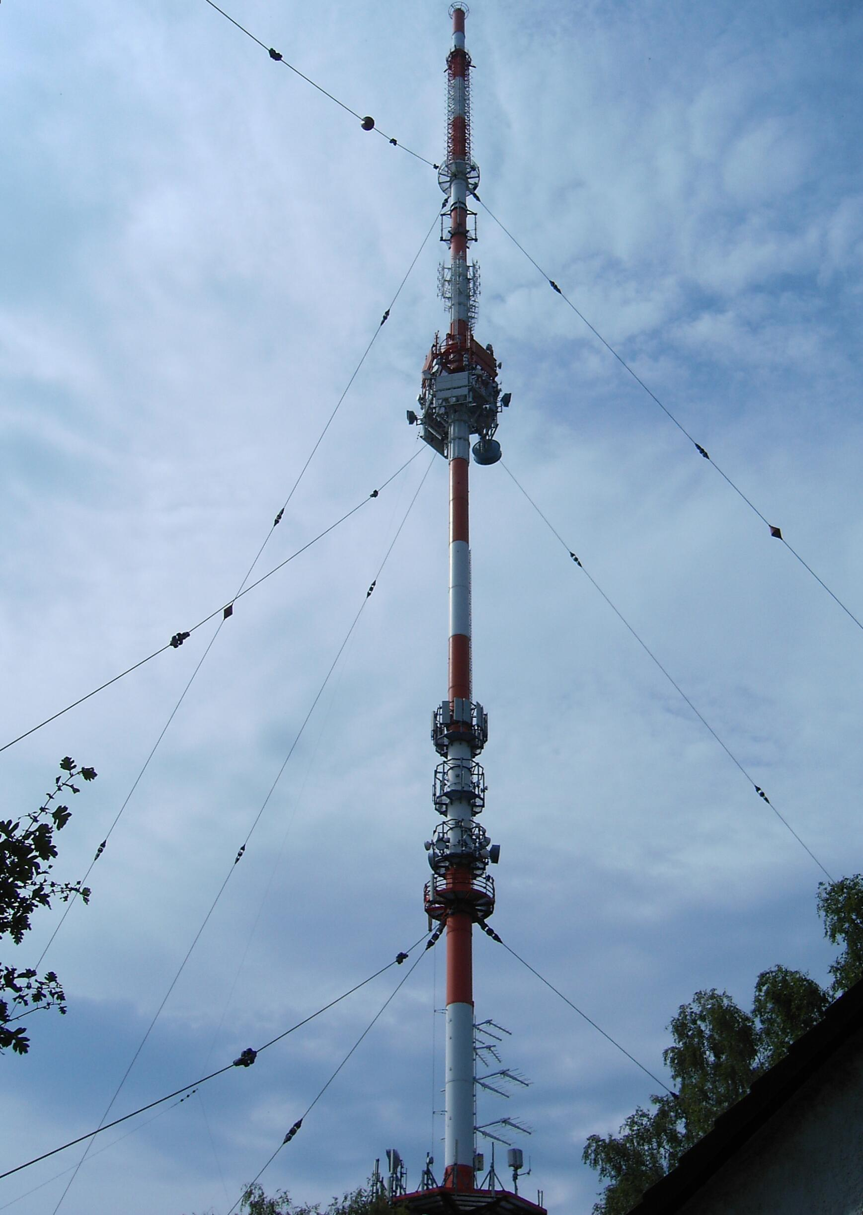 180 Meter hoher Sendemast des WDR auf dem Venusberg in Bonn.